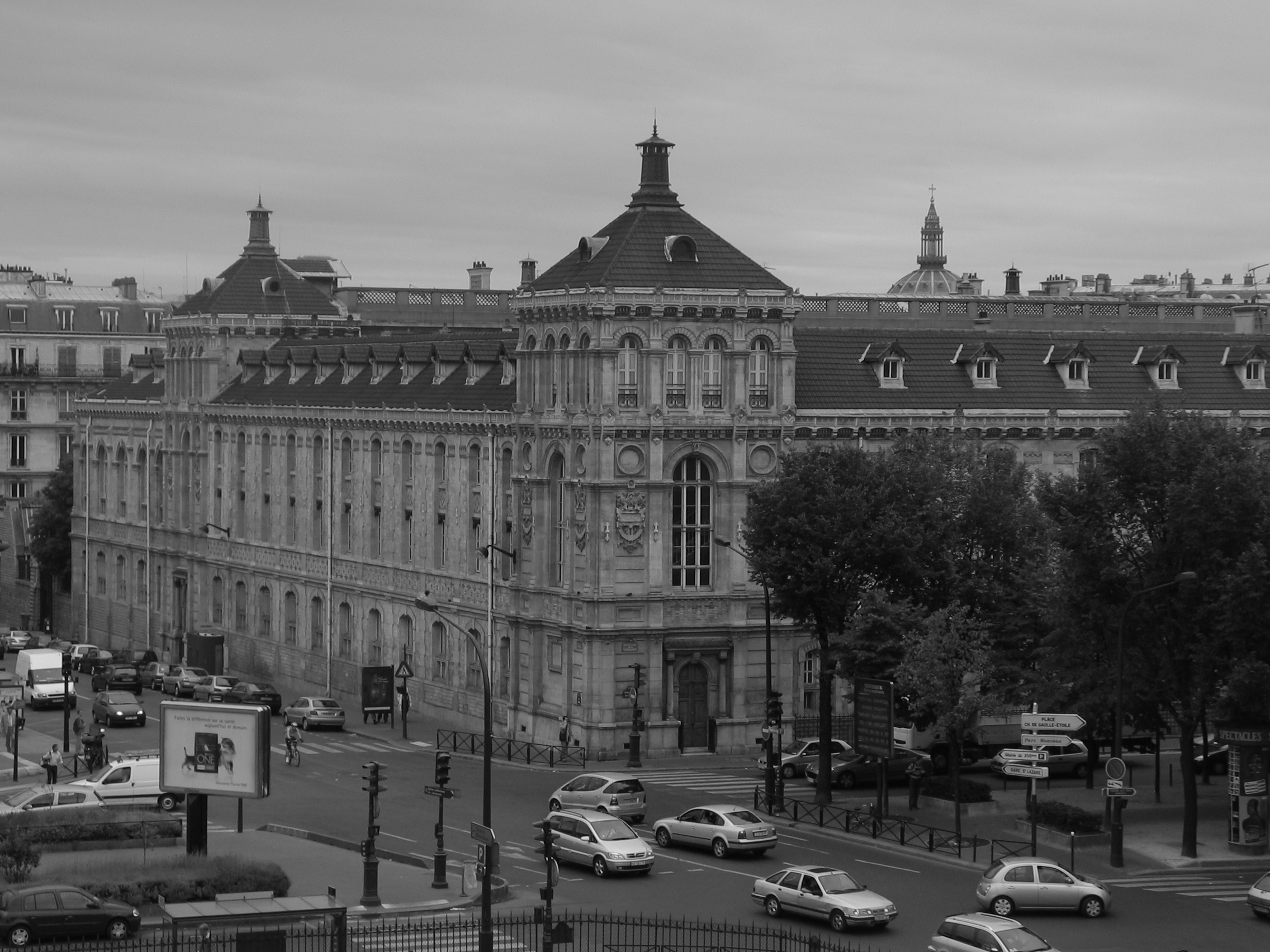 photographie du lycée chaptal faite le 21/05/2005. Faite avec mon appareil.